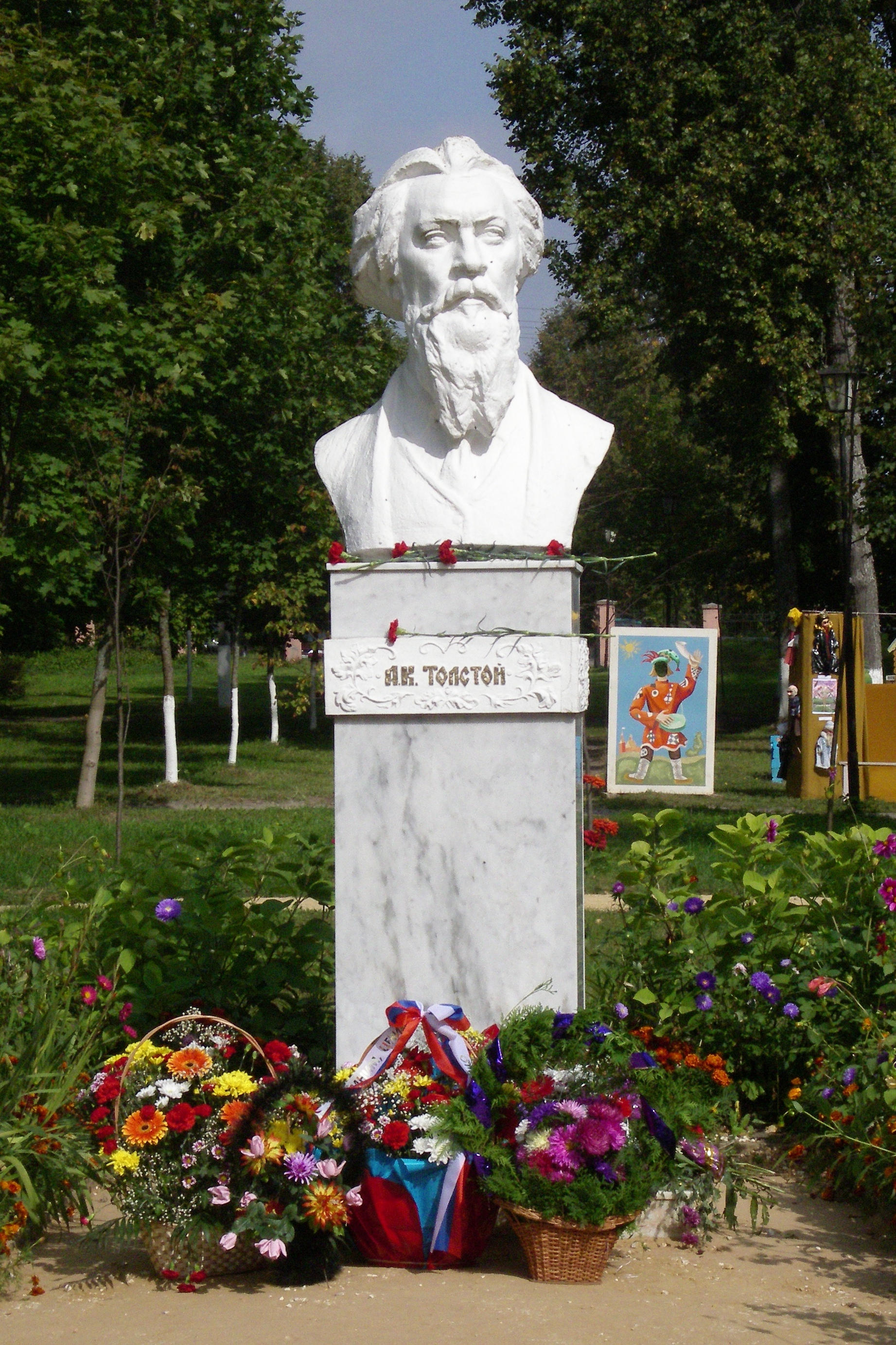 Памятник в имении Красный рог